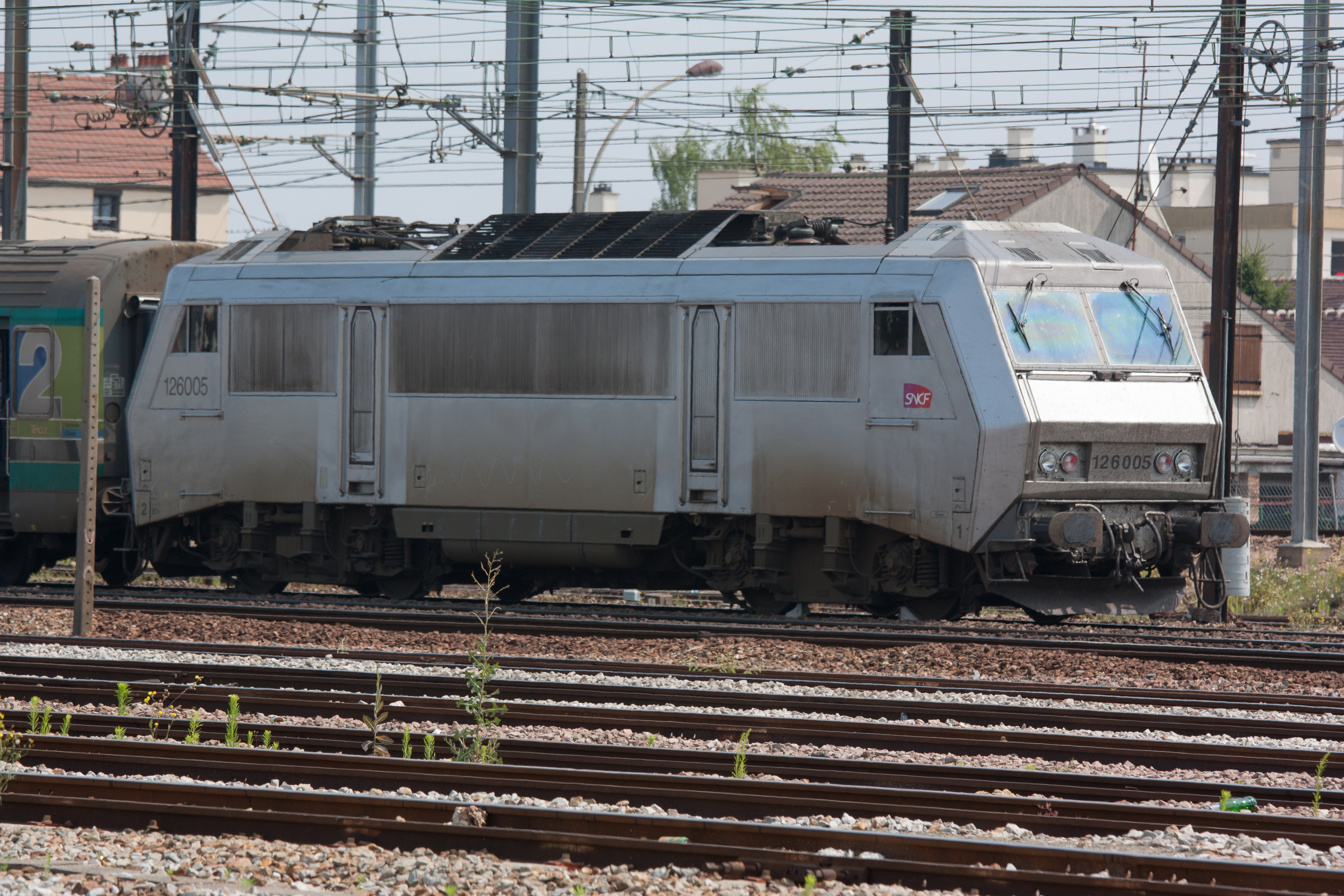 Accident ferroviaire de Brétigny-sur-Orge - Photos du train no 3657 (locomotive et voitures 1 à 4) en gare de Brétigny - Essonne - France